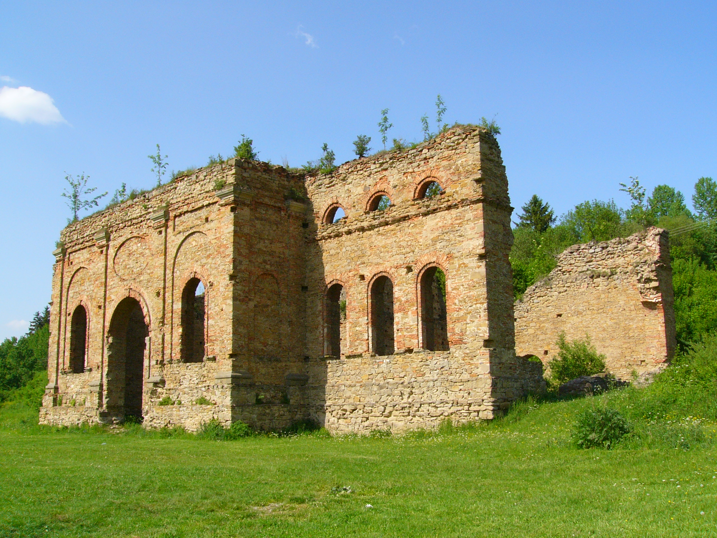 Františkova huta This medium shows the protected monument with the number 510-295/0 in the Slovak Republic.